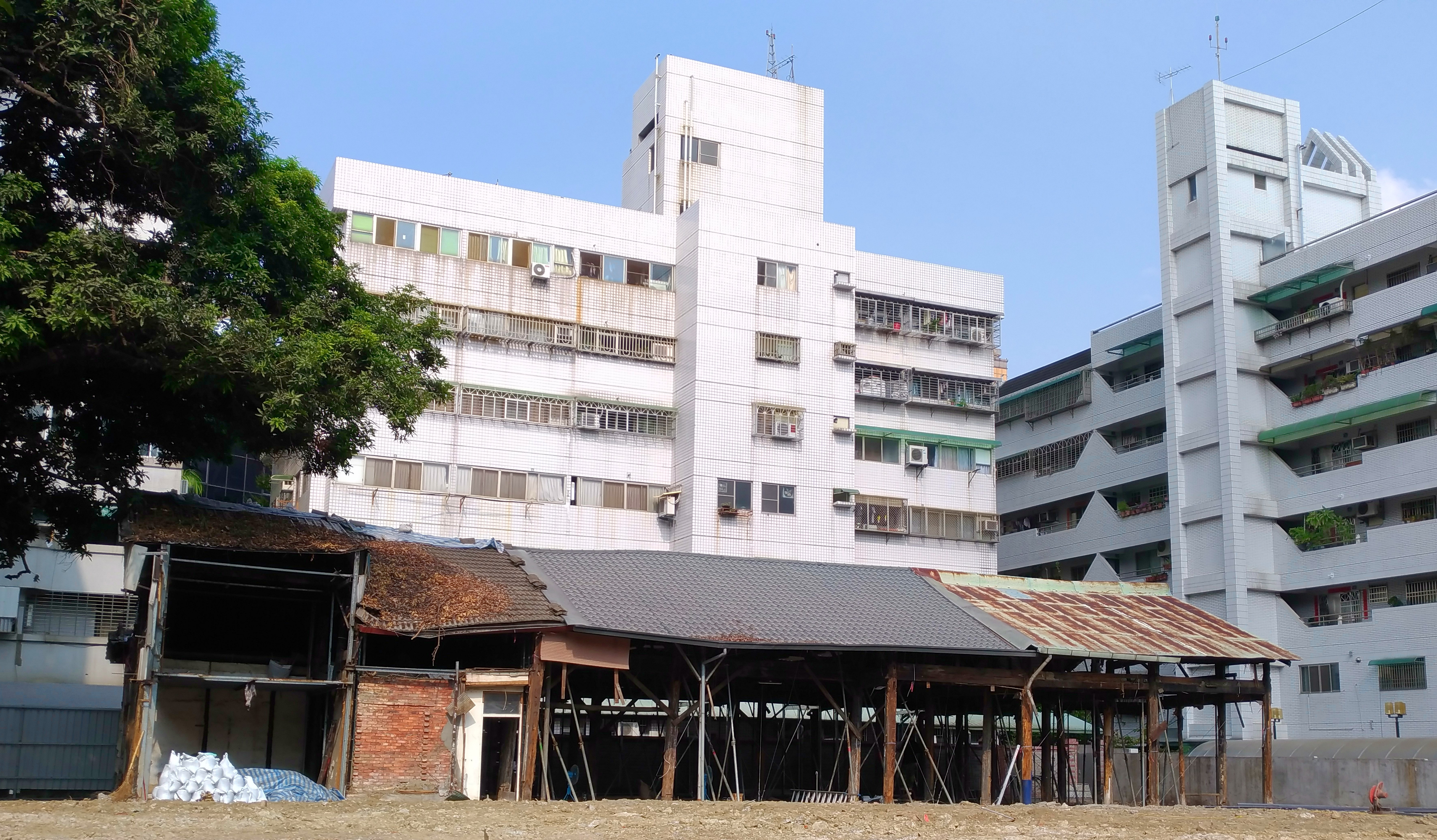 臺灣省城儒考棚2017年10月情況